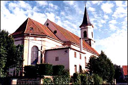 Eglise St Louis